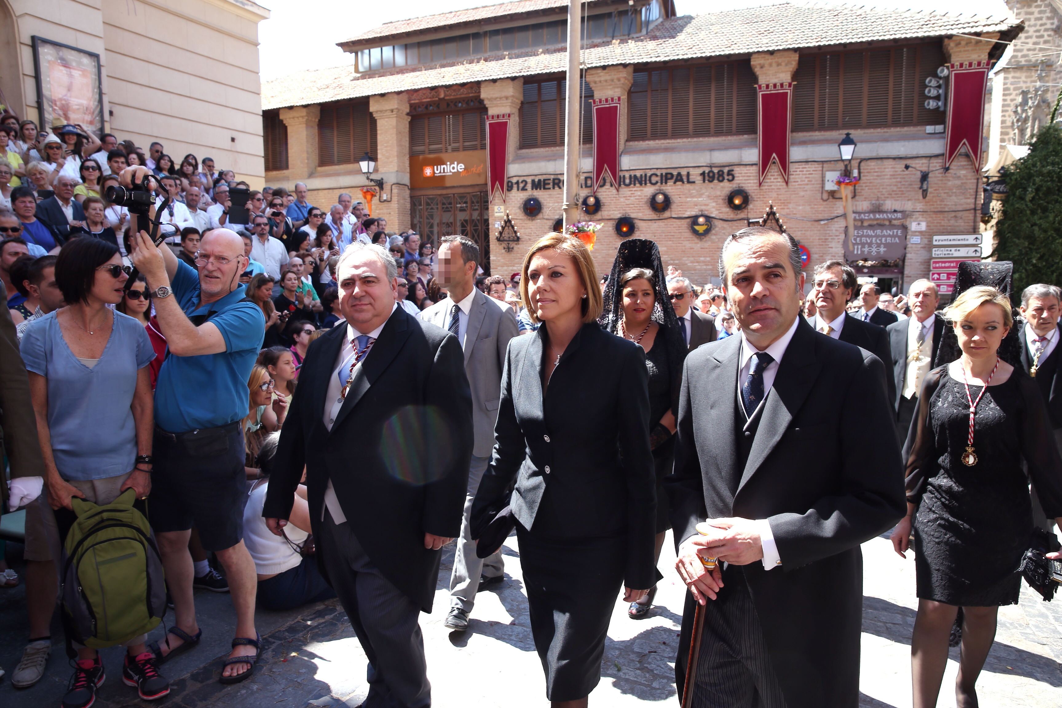 Cospedal pone de manifiesto “la devoción y amor de los castellano-manchegos y de todos los españoles por la ciudad de Toledo” Agradece al ministro del Interior, Jorge Fernández Díaz, su visita a la ciudad de Toledo para “compartir y disfrutar” esta celebración